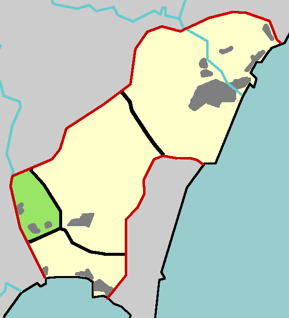 Distrito Interior de San Roque (Cádiz)